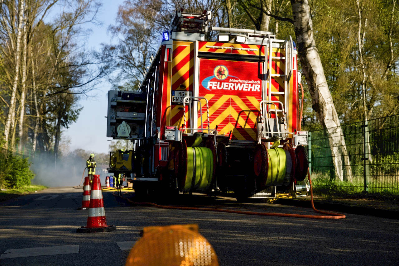 TH Einsatz #FWMG